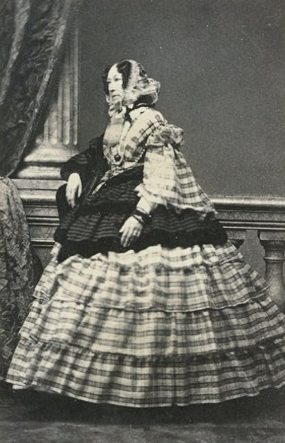 Софья Фёдоровна Тимирязева, ур. Вадковская, в первом браке Безобразова (06.02.1799—08.08.1875)